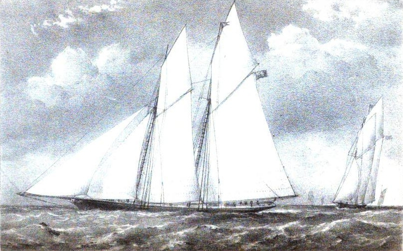 Lithographie de T. G. Dutton, d'après une peinture de Arthur Wellington Fowles (1815-1883) parue dans Hunt's Yachting Magazine Volume 20 de 1871.